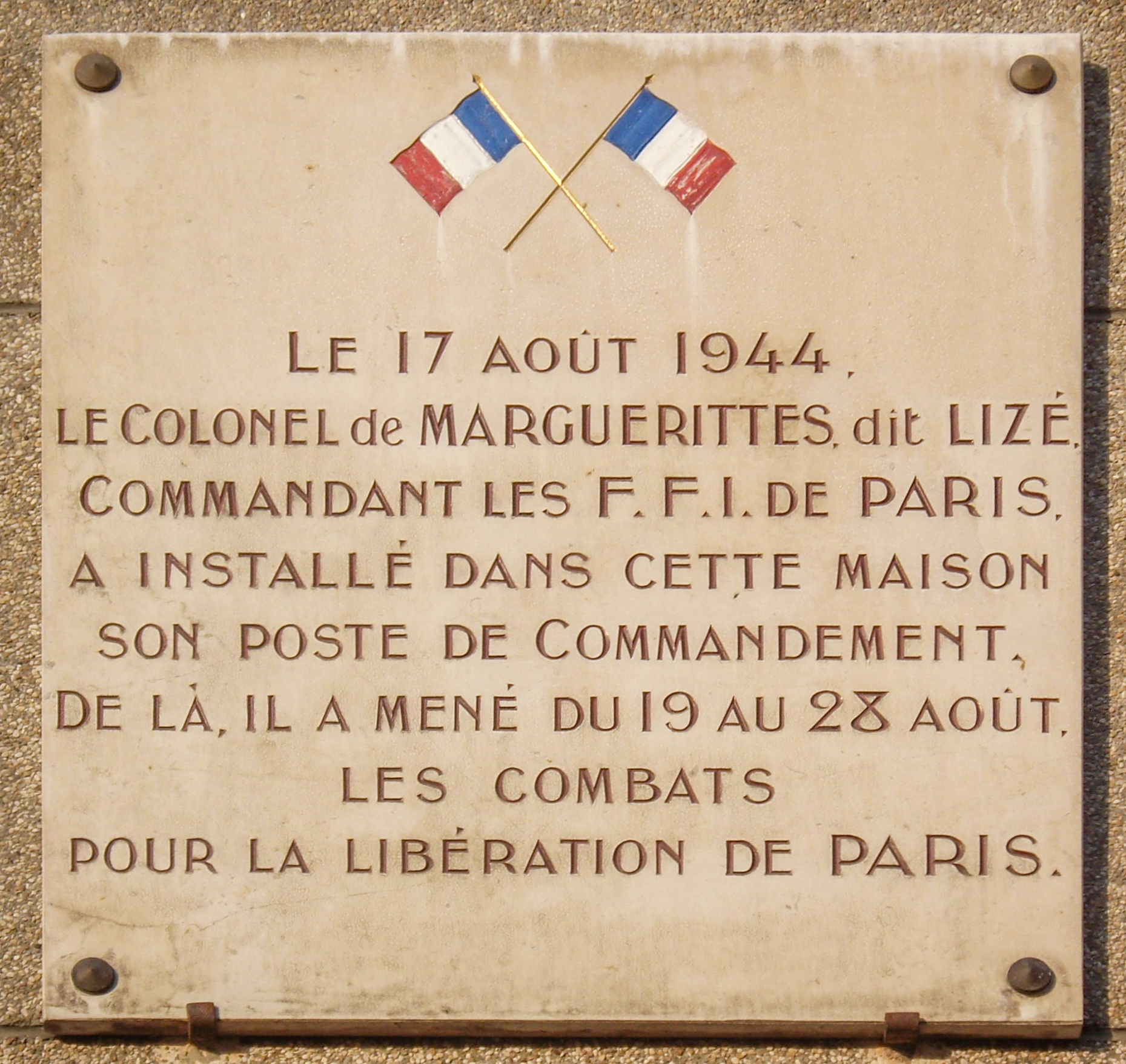 Plaque apposée au n° 5 du quai de Conti, Paris 6e.« Le 17 août 1944, le colonel de Marguerittes, dit Lizé, commandant des FFI de Paris, a installé dans cette maison son poste de commandement. De là, il a mené du 19 au 28 août les combats pour la libération de Paris. »